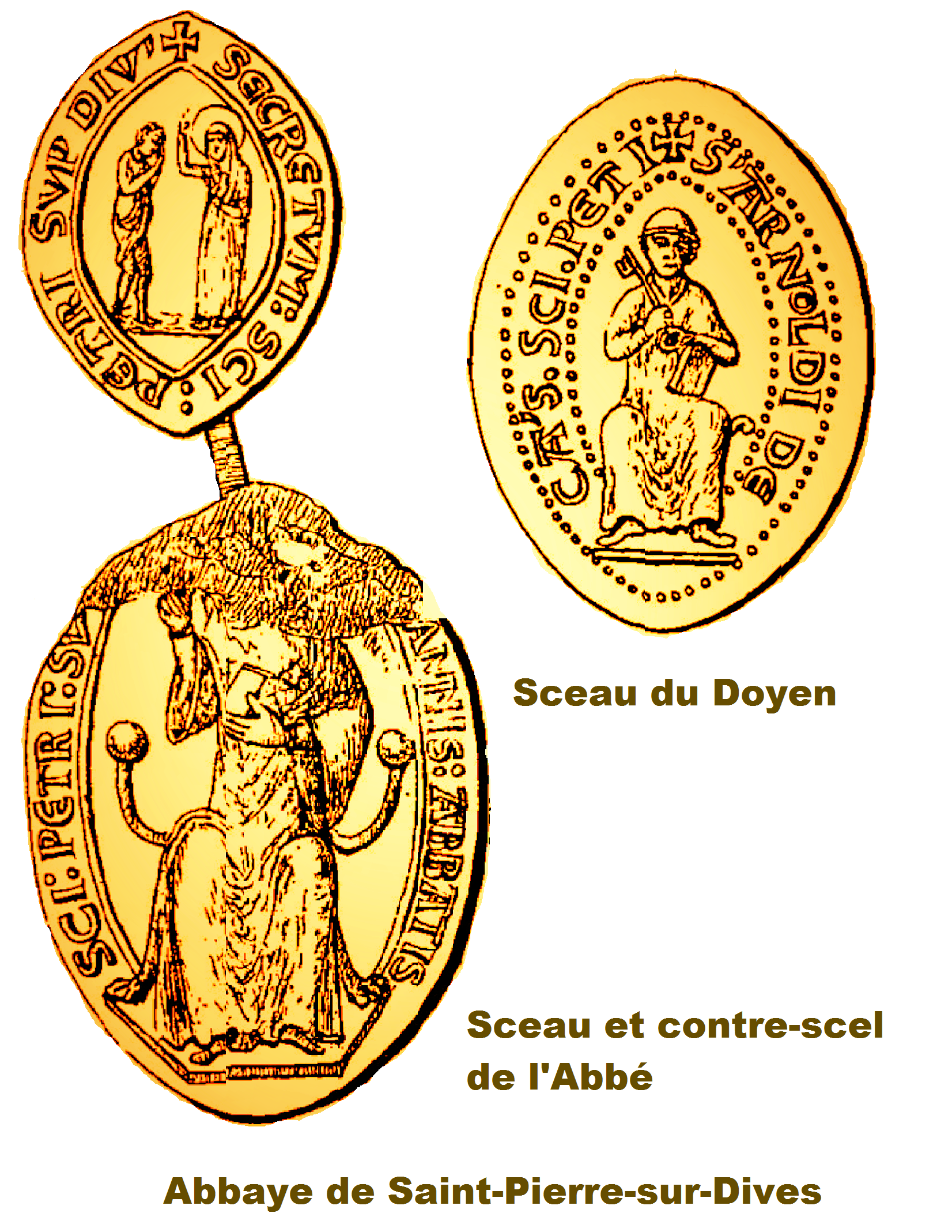 Abbaye de Saint-Pierre-sur-Dives, Calvados, Sceaux (gravure ancienne retouchée)